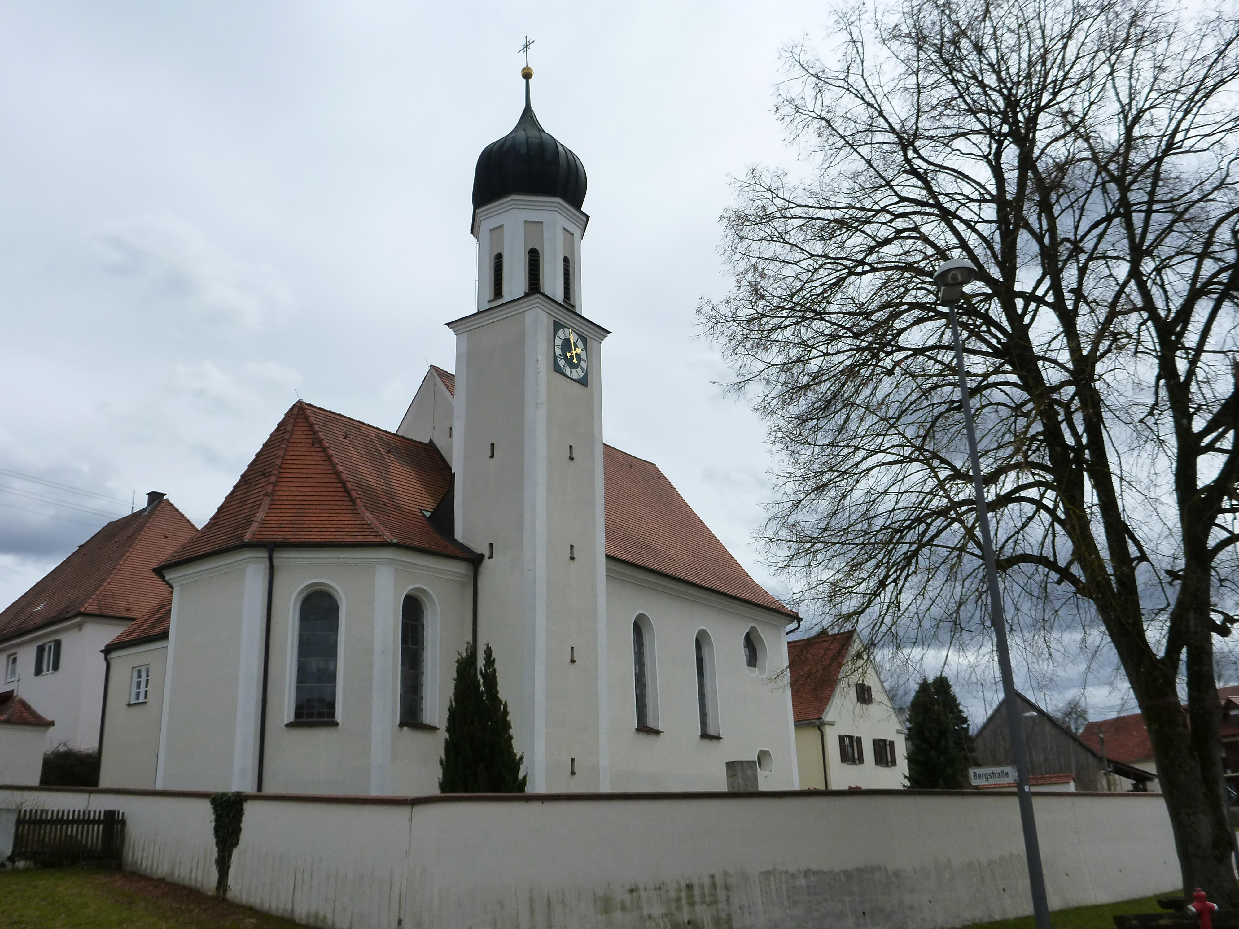 Katholische Pfarrkirche St. Martin, Neubau 1722 von Jörg Radmiller; mit Ausstattung.